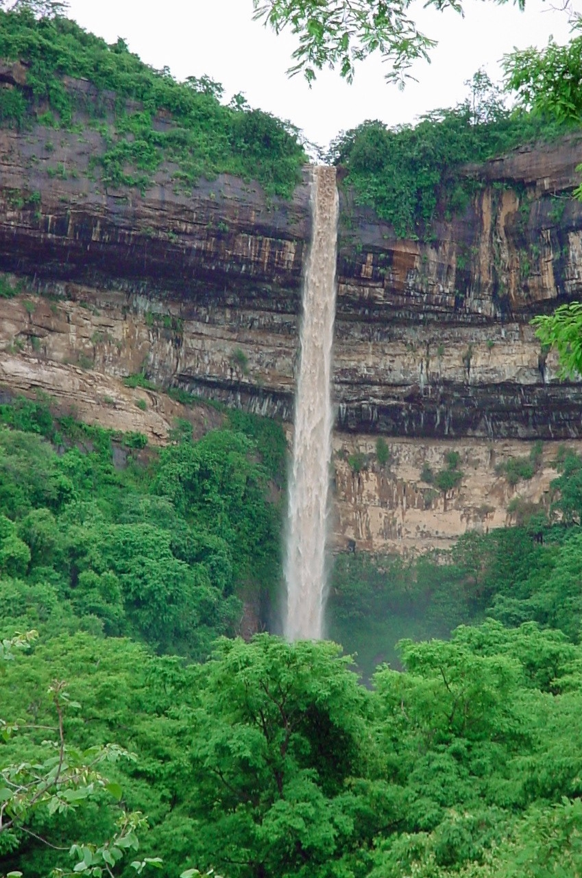 Bica do Ipu é uma queda d'água de 130 metros de altura do Riacho Ipuçaba, no estado do Ceará, Brasil.